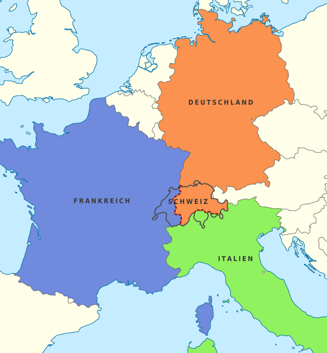 Aufteilung der Schweiz nach UNO-Antrag Muammar al-Gaddafis